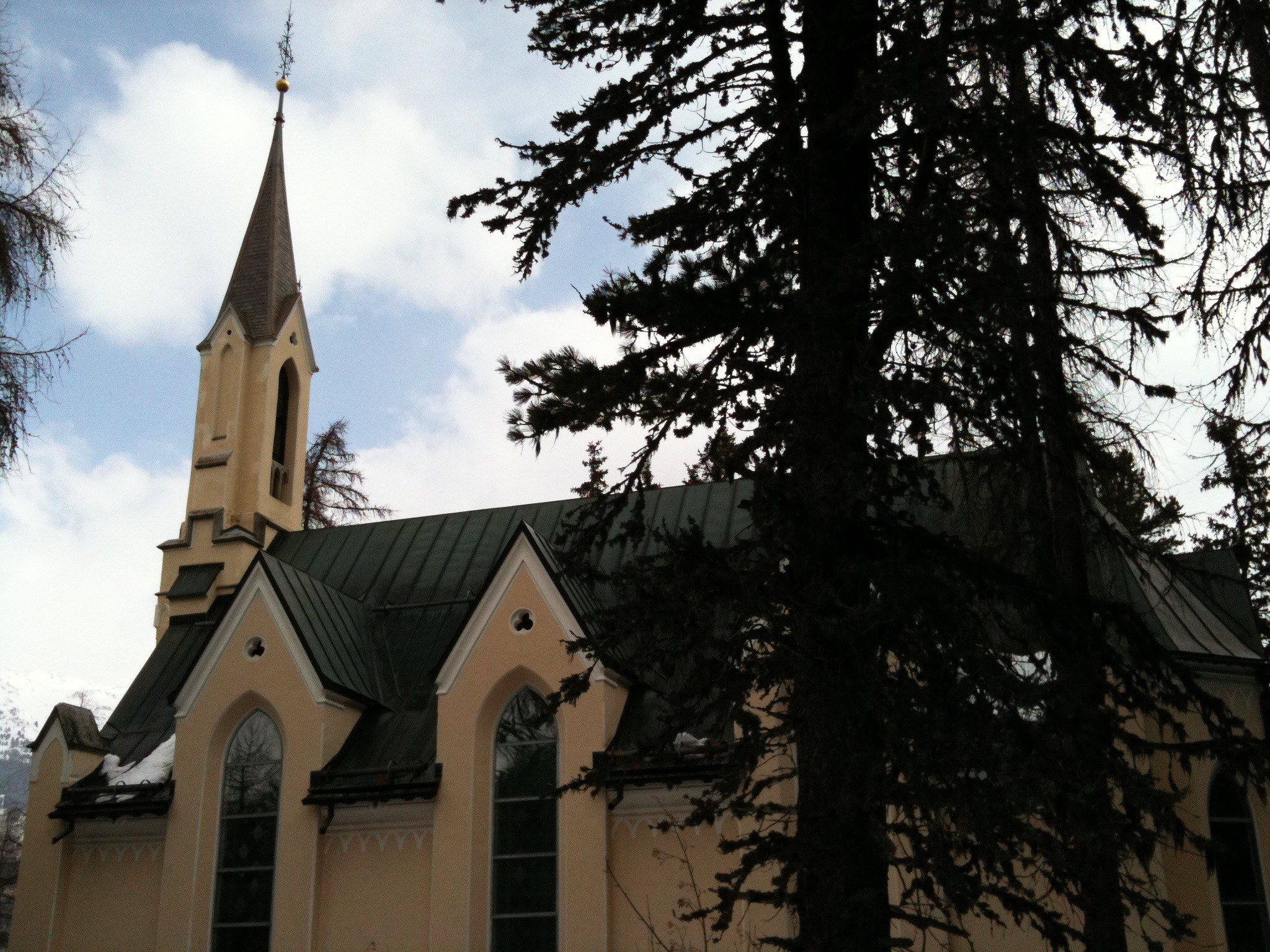 Französische Kirche St. Moritz, Kanton Graubünden